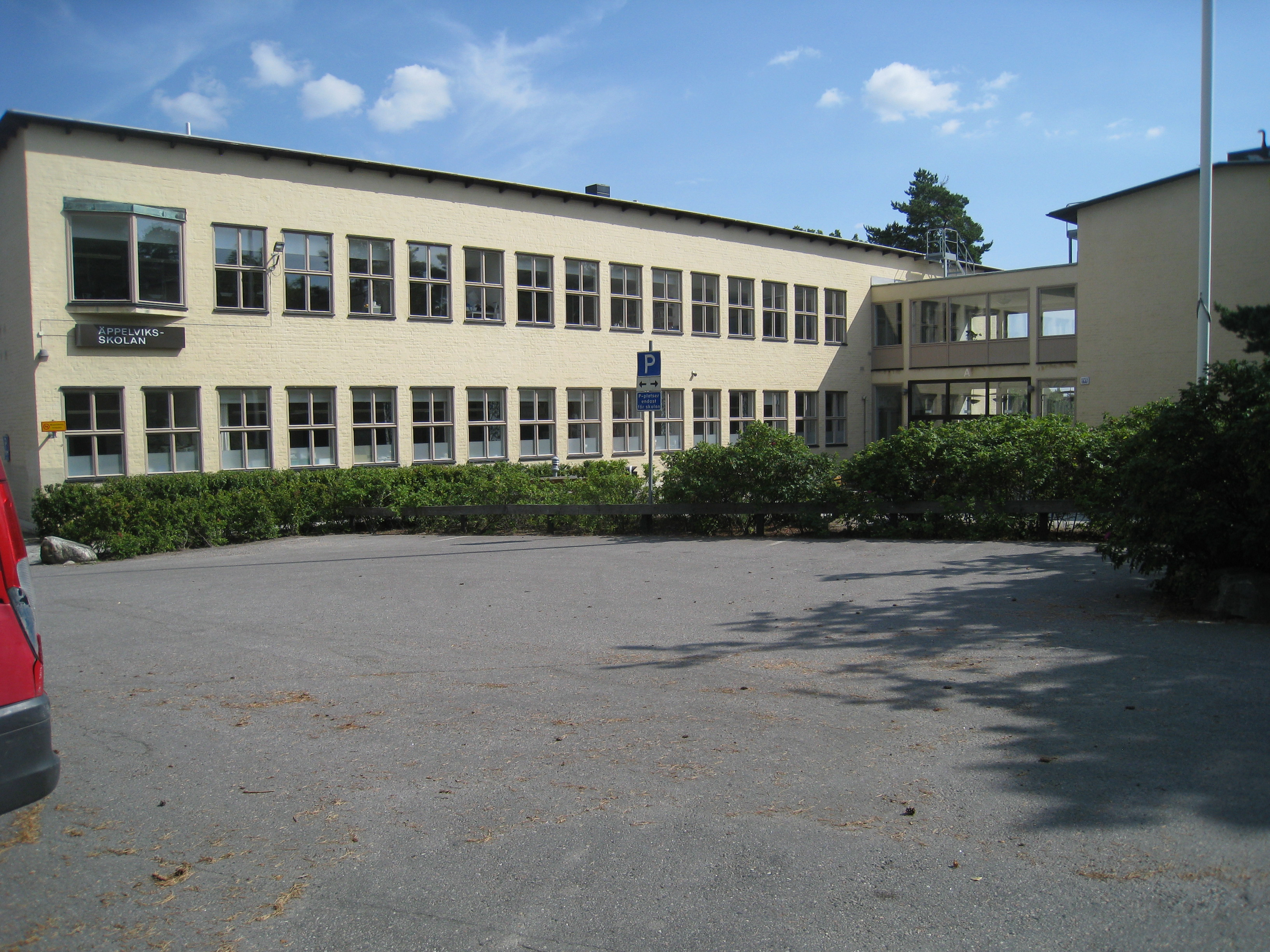 Äppelviksskolan, Alviksvägen 97, Bromma. Skolbyggnaden med huvudentrén. Byggnadens äldre del uppfördes omkring 1925 och var ursprungligen Smedslättens folkskola. Arkitekt vid byggnationen 1941-1942 var Paul Hedqvist.